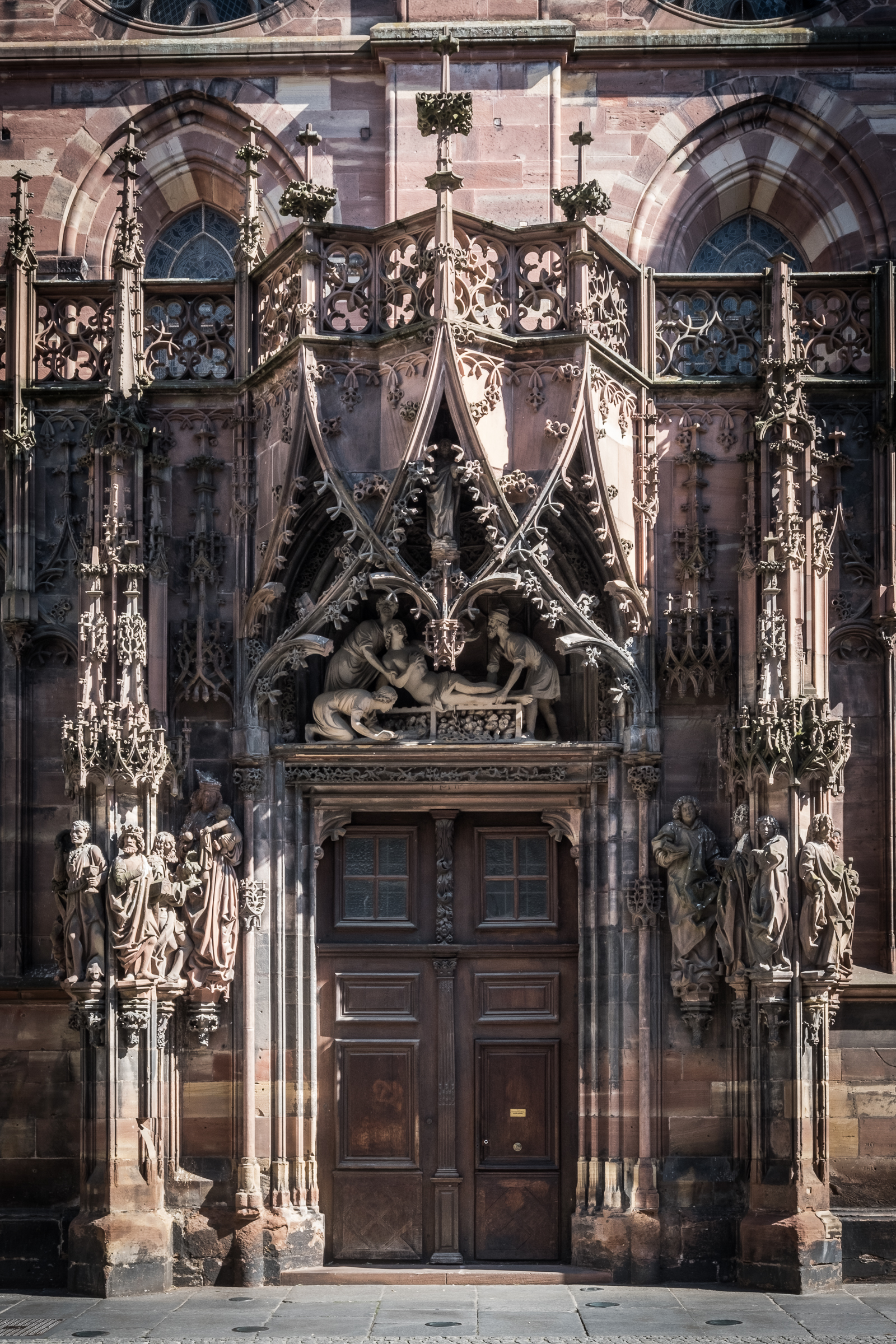 Strasbourg, Cathédrale Notre Dame. Portail nord Saint-Laurent. 2020.